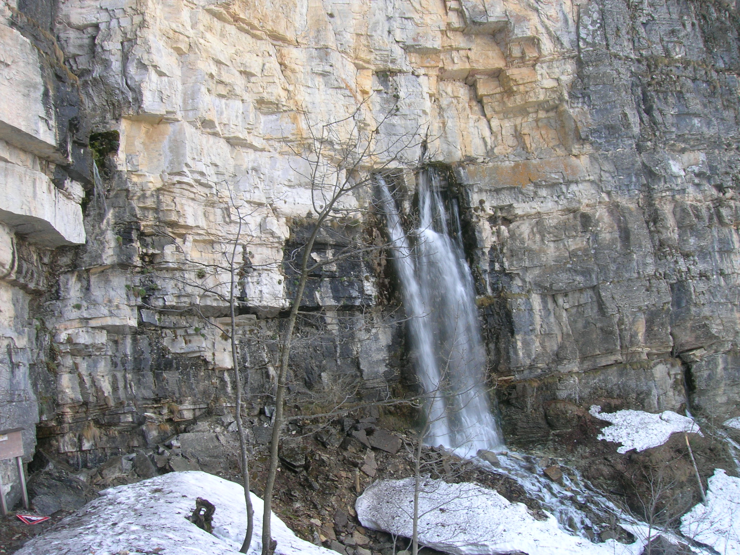 "Sorgenti del Pis" - Fiume Pesio (Cuneo, Piemonte, Italy)